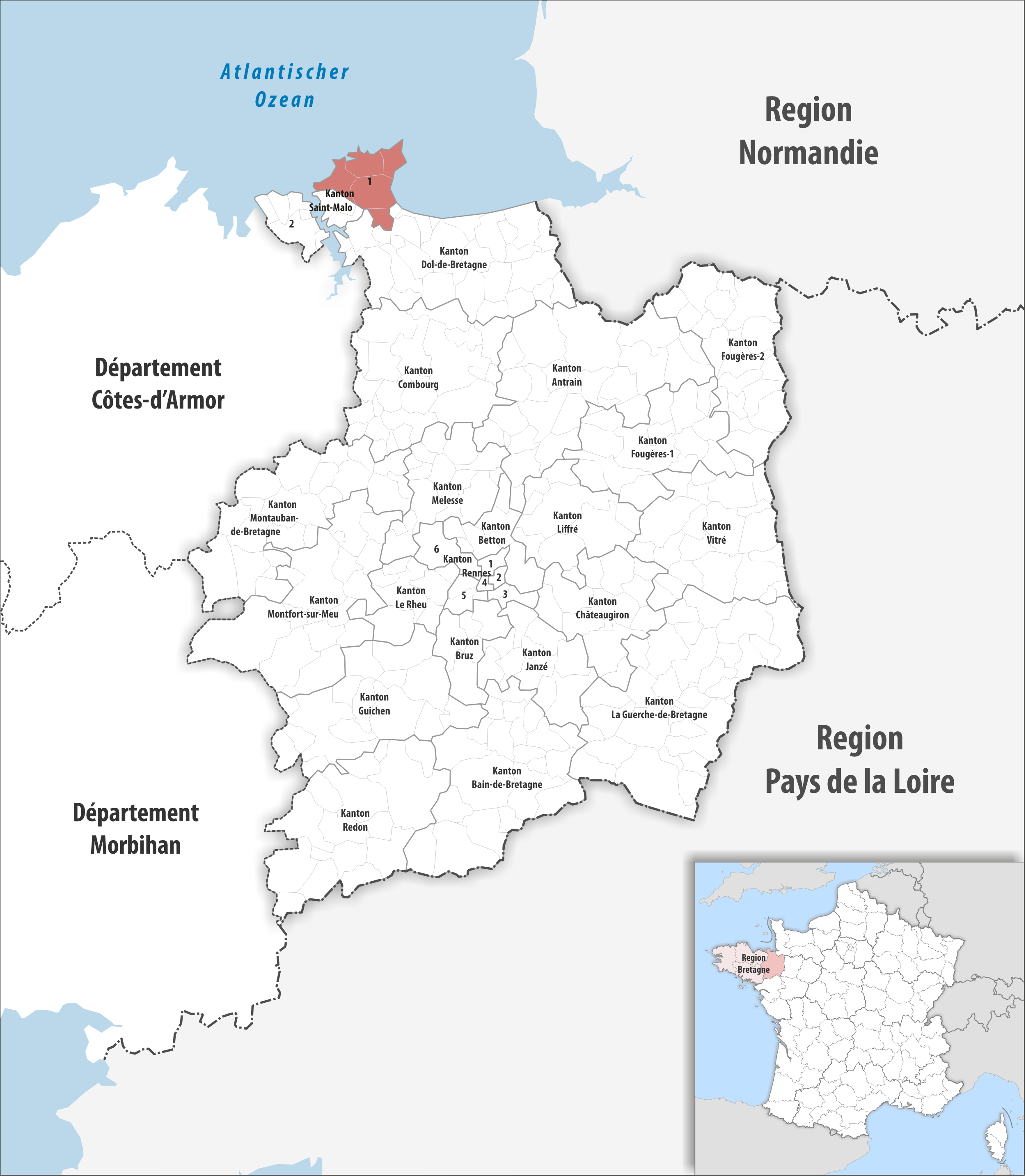 Lage des Kantons Saint-Malo-1